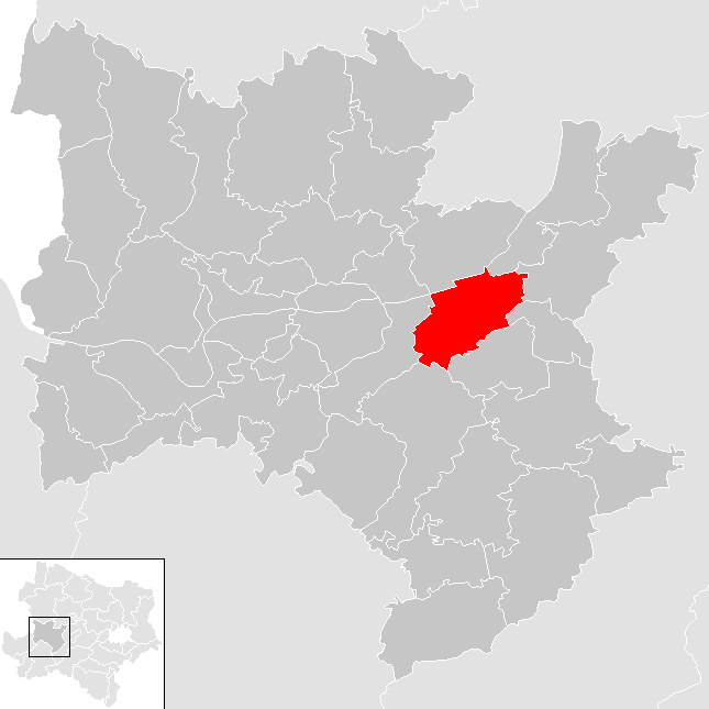 Bezirk Melk